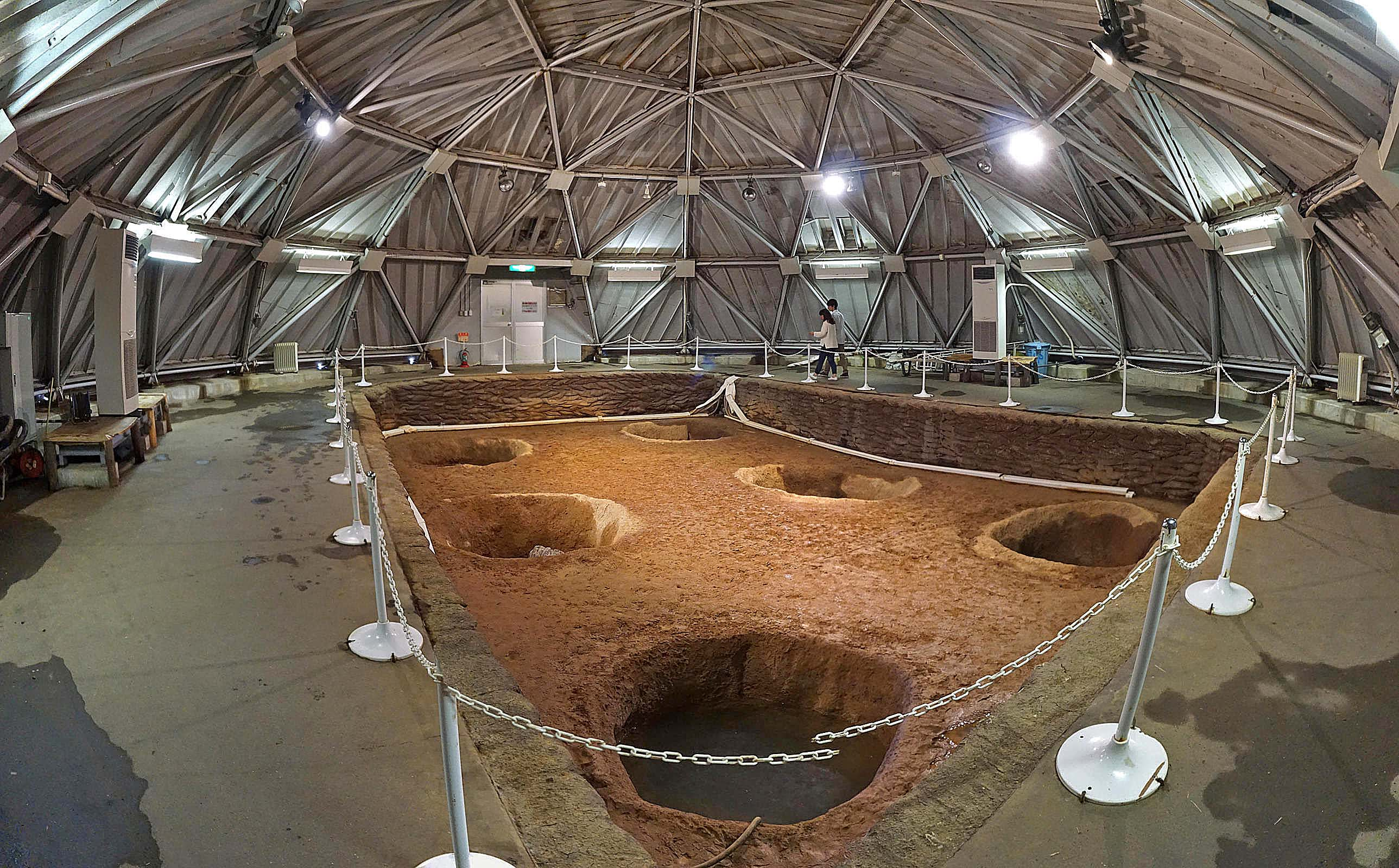 Sannai-Maruyama site , 三内丸山遺跡